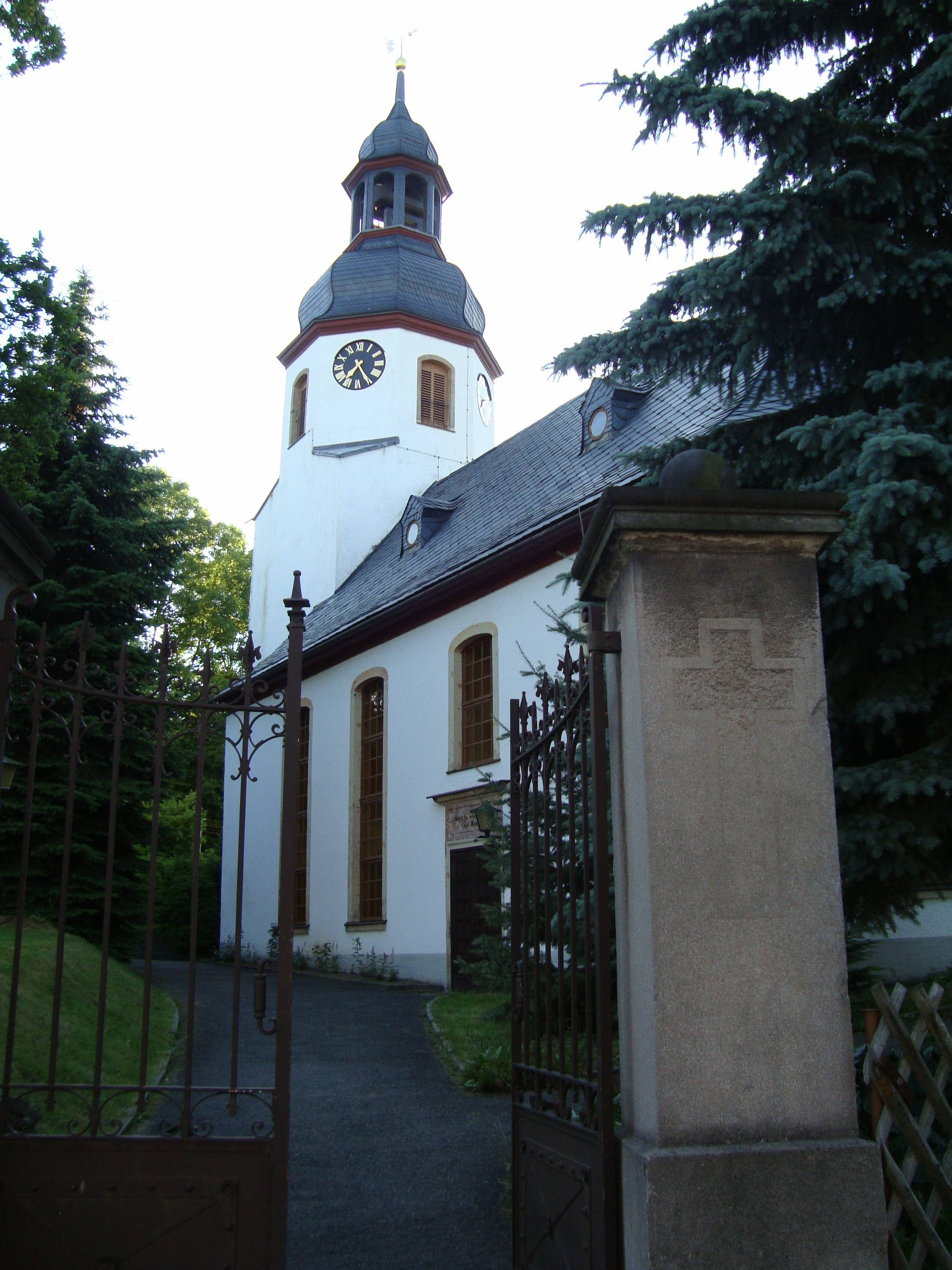 Kirche von Auerbach (Erzgebirge)